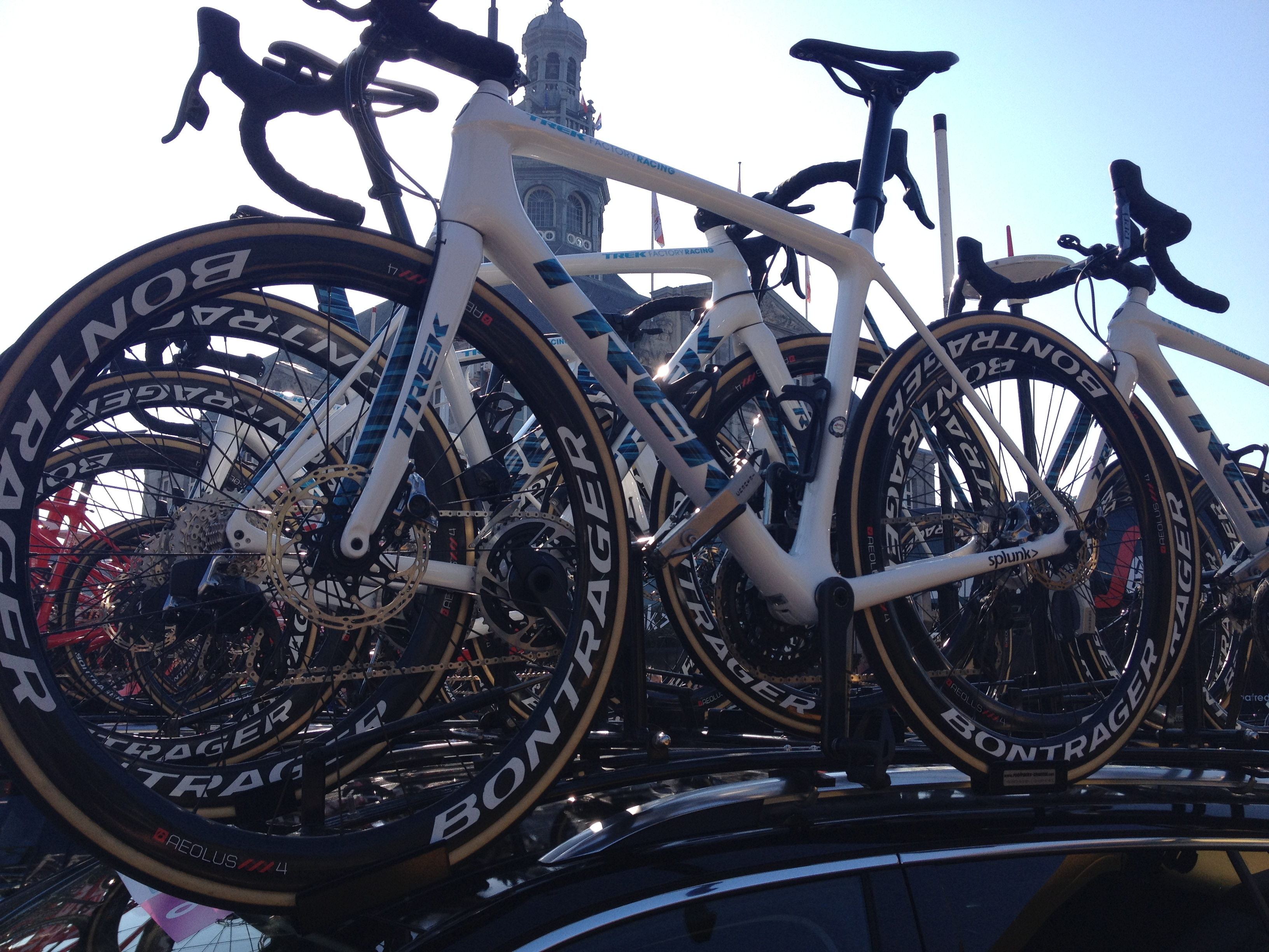 Start van de Amstel Gold Race Ladies Edition 2019 in Maastricht